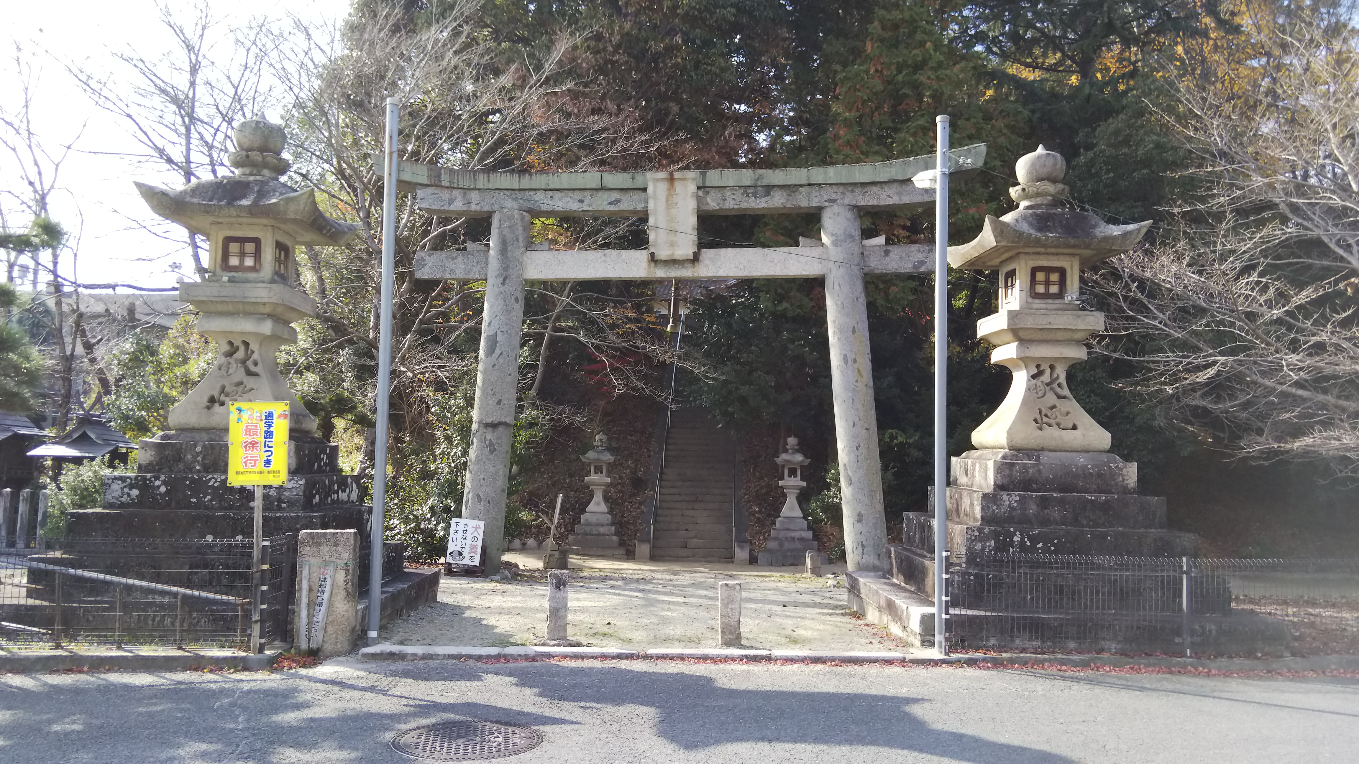 牟佐坐神社鳥居